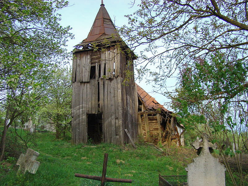 Biserica de lemn din Vingard